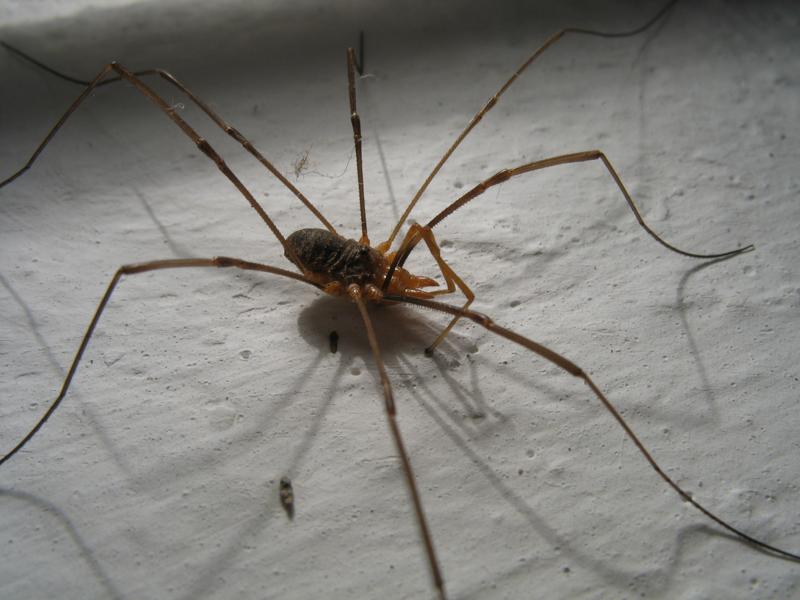 Kosarz pospolity (Phalangium opilio), zdjęcie zrobione w Gliwicach